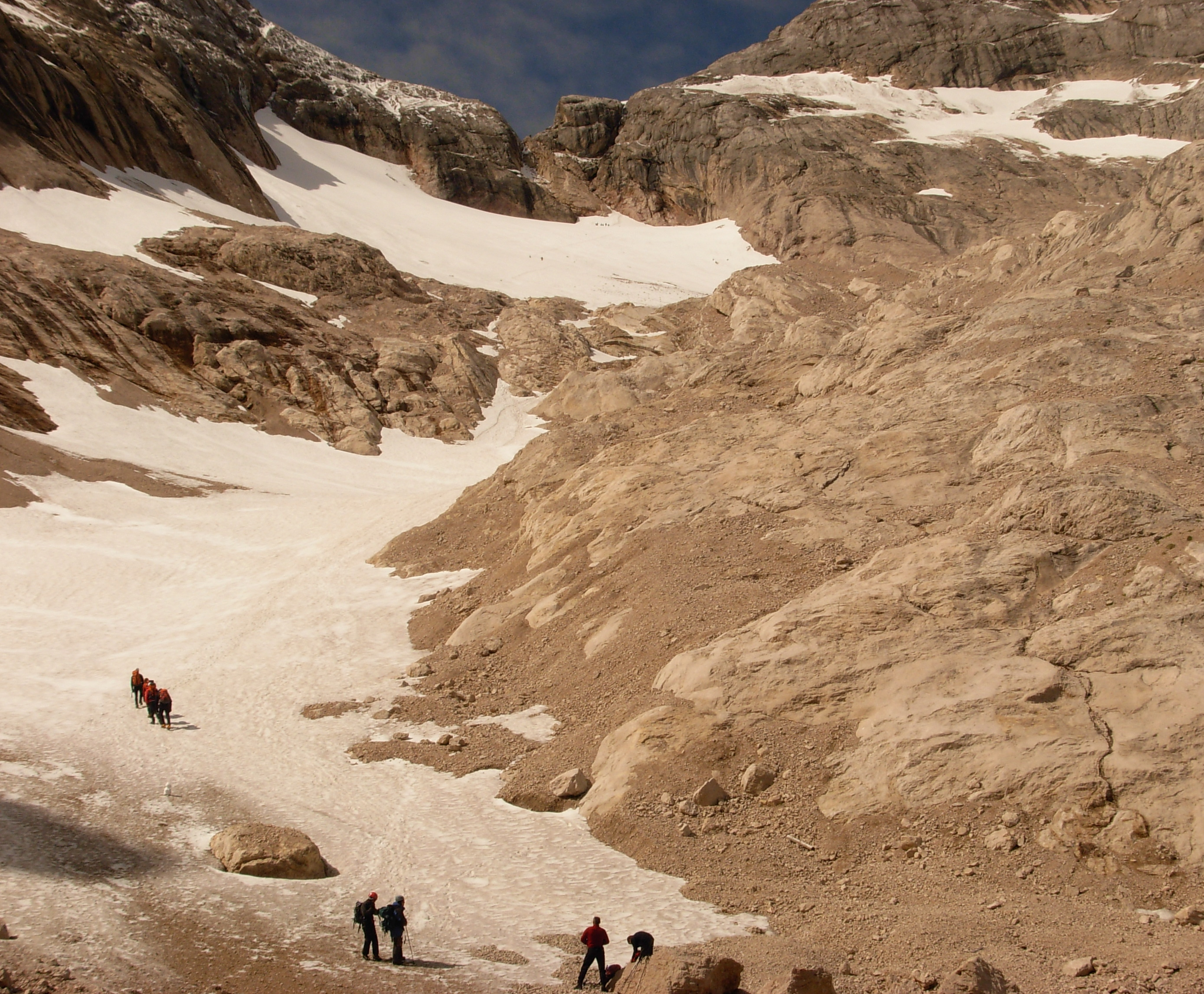 Vernelio ledynas/Vernelgletscher. Ledyno viršuje Forcella Marmolada perėja